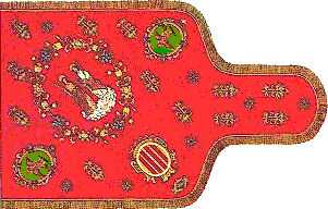 "Bandera de la ciudad de Orihuela"